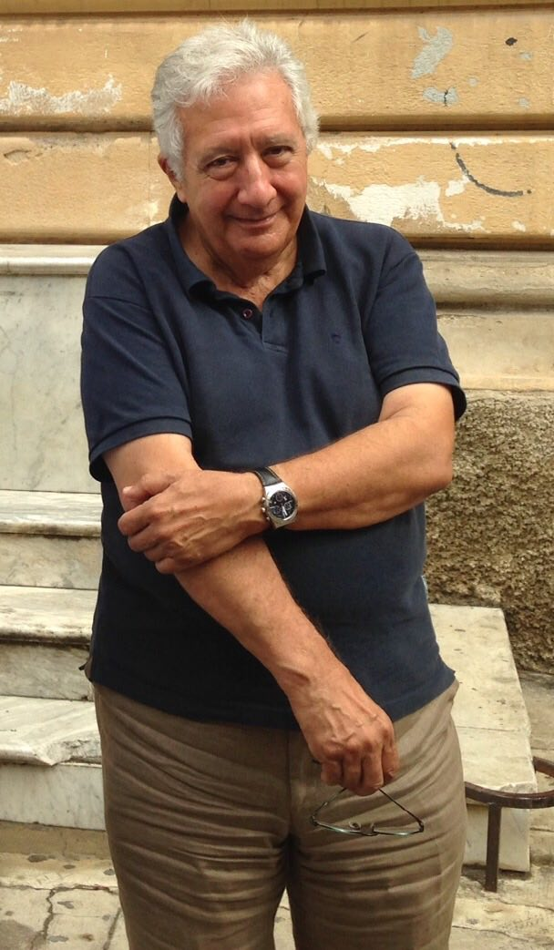 Settimo Termini